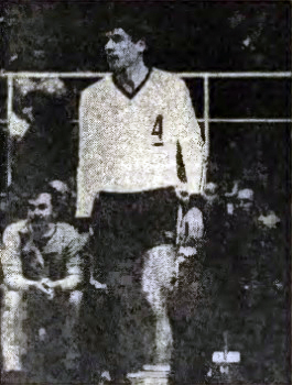 Siatkarz Andrzej Skorupa - sezon 1986/87